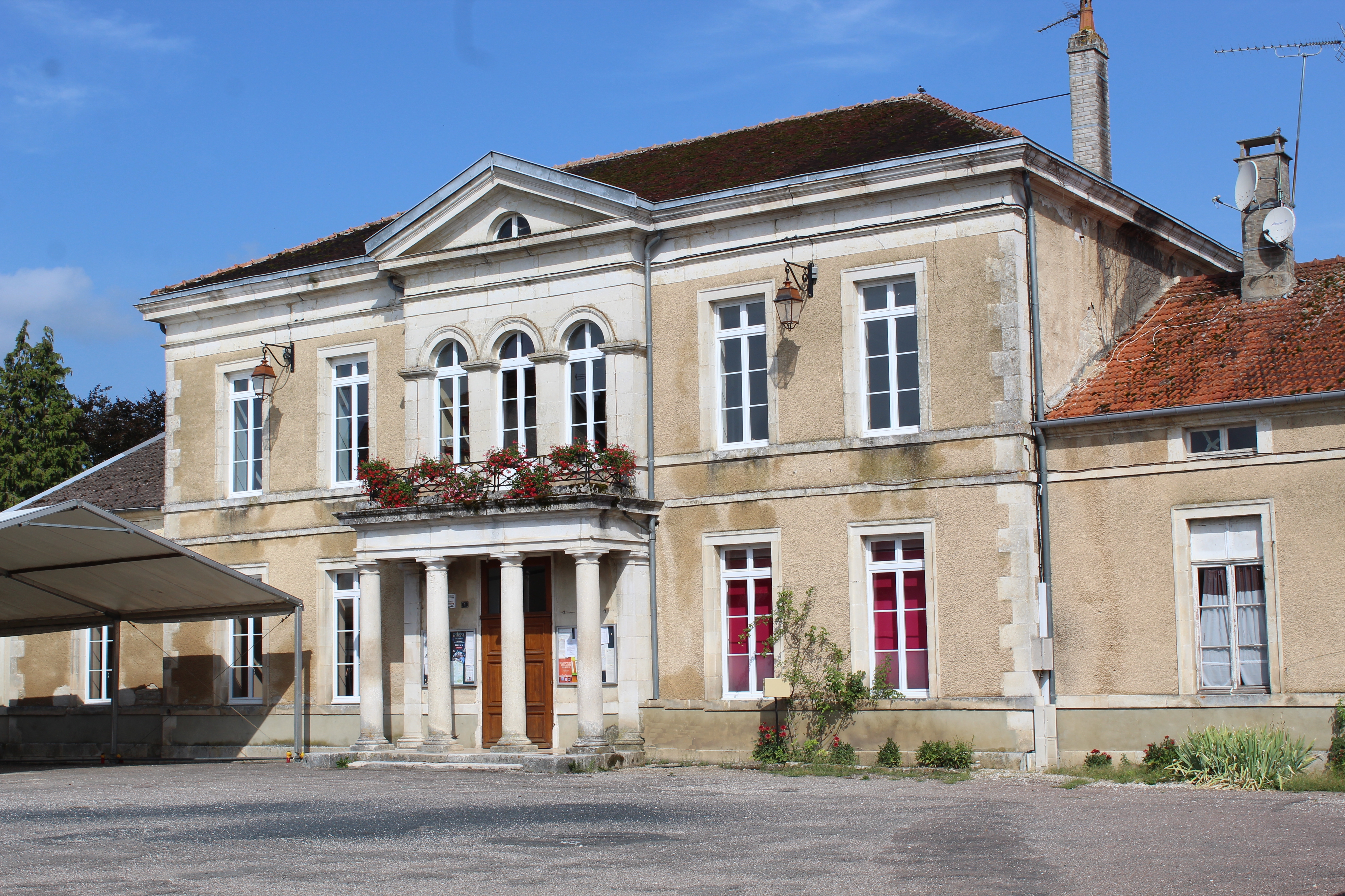 La mairie